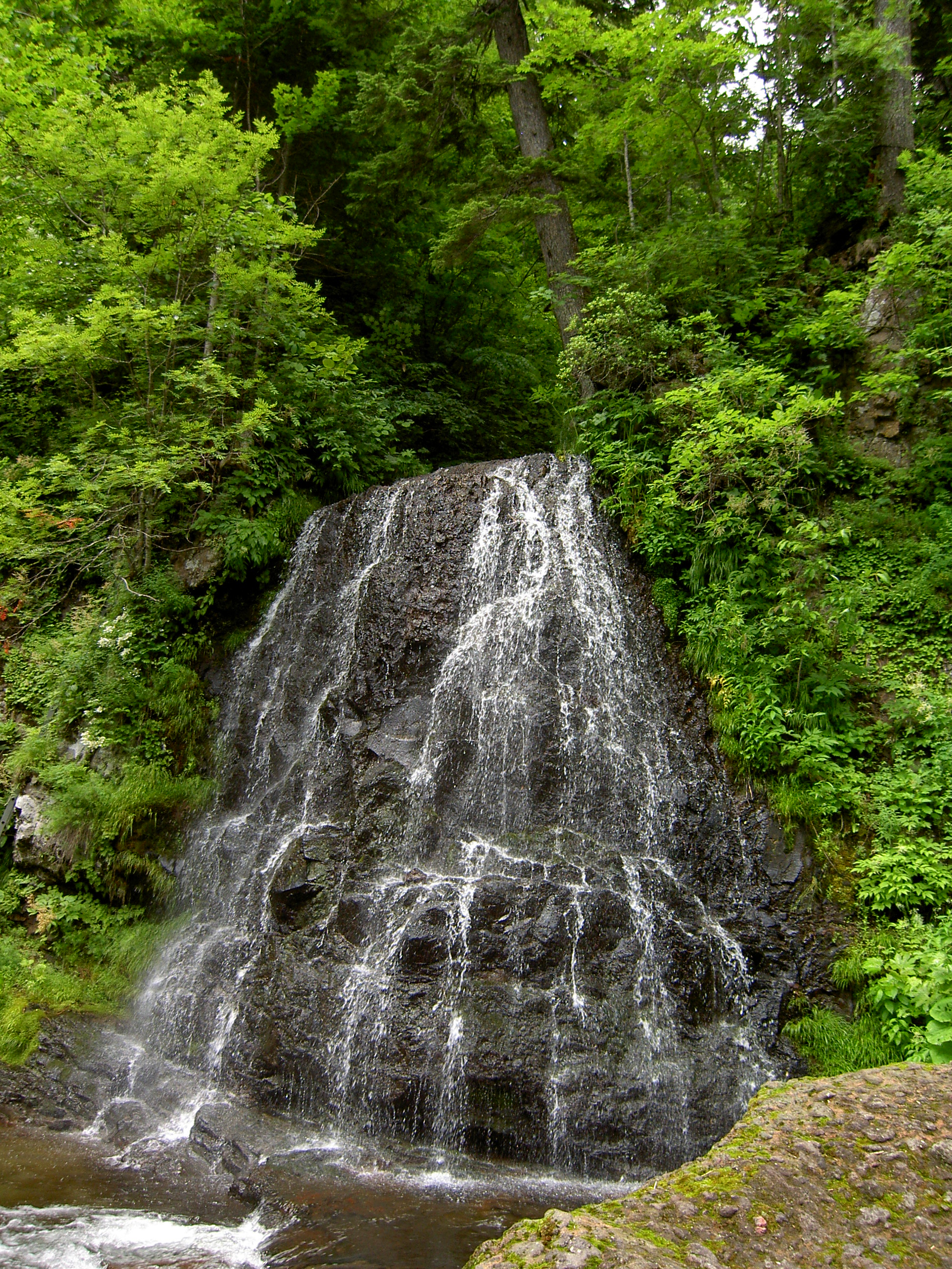 行者の滝（西興部村）